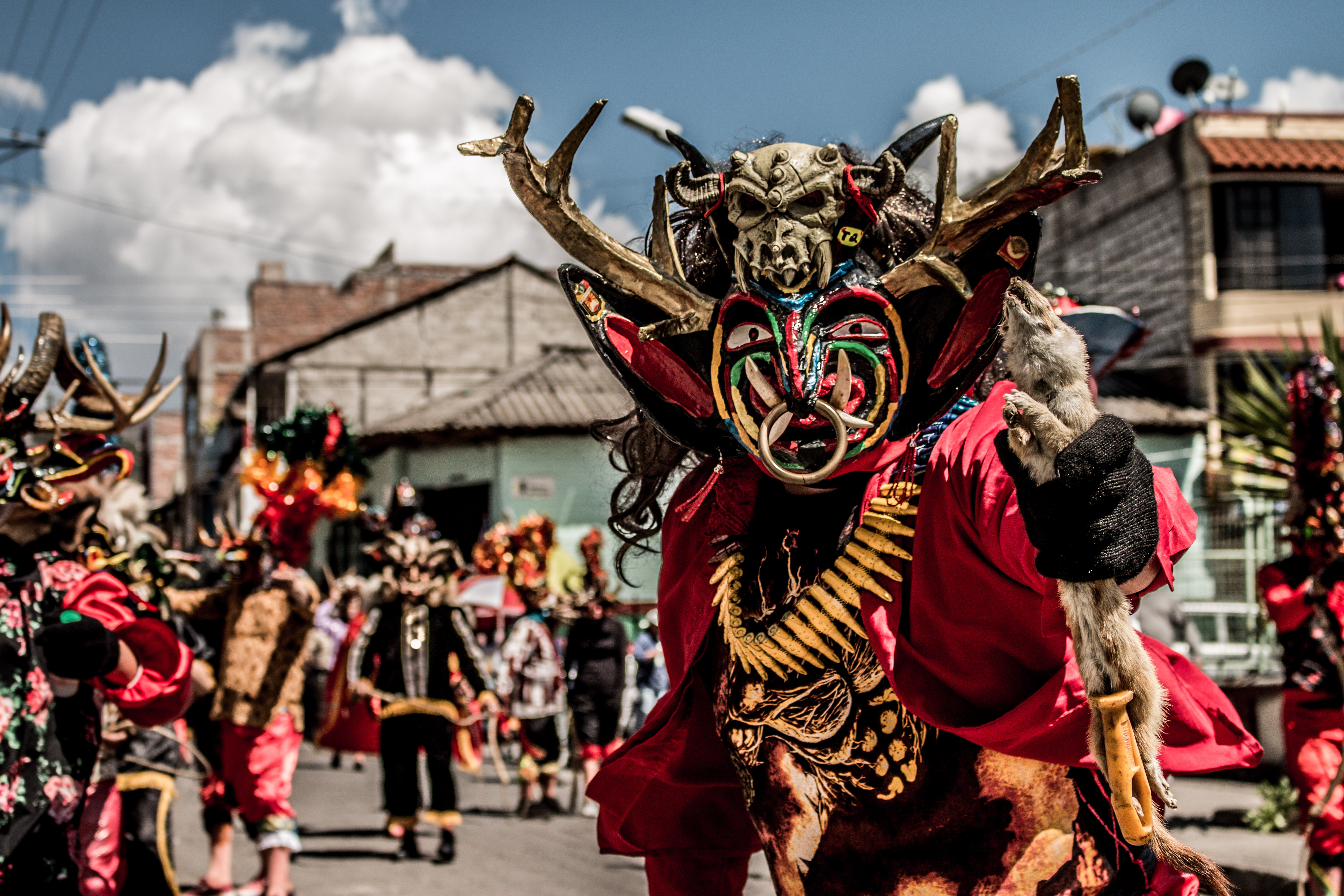 Detalle de diabladas de Píllaro, Ecuador.